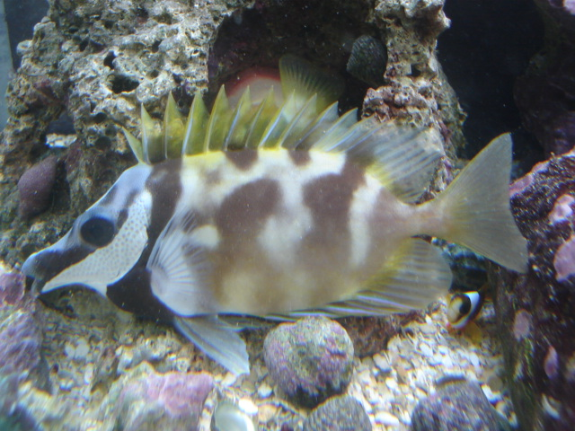 Siganus vulpinus estresado, desarrolla una coloración críptica para pasar inadvertido